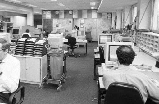 Newsroom von Radio Free Europe/Radio Liberty in München 1994. Fotografie aus einer Serie, veröffentlicht in: M Menschen machen Medien Zeitschrift der IG Medien Nr. 2/1994 Jahrgang 43, Seite: 31: „Schwere Hindernisse beim rationellen Verkleinern“. Kündigungen und Umzugspläne bei RFE/RL